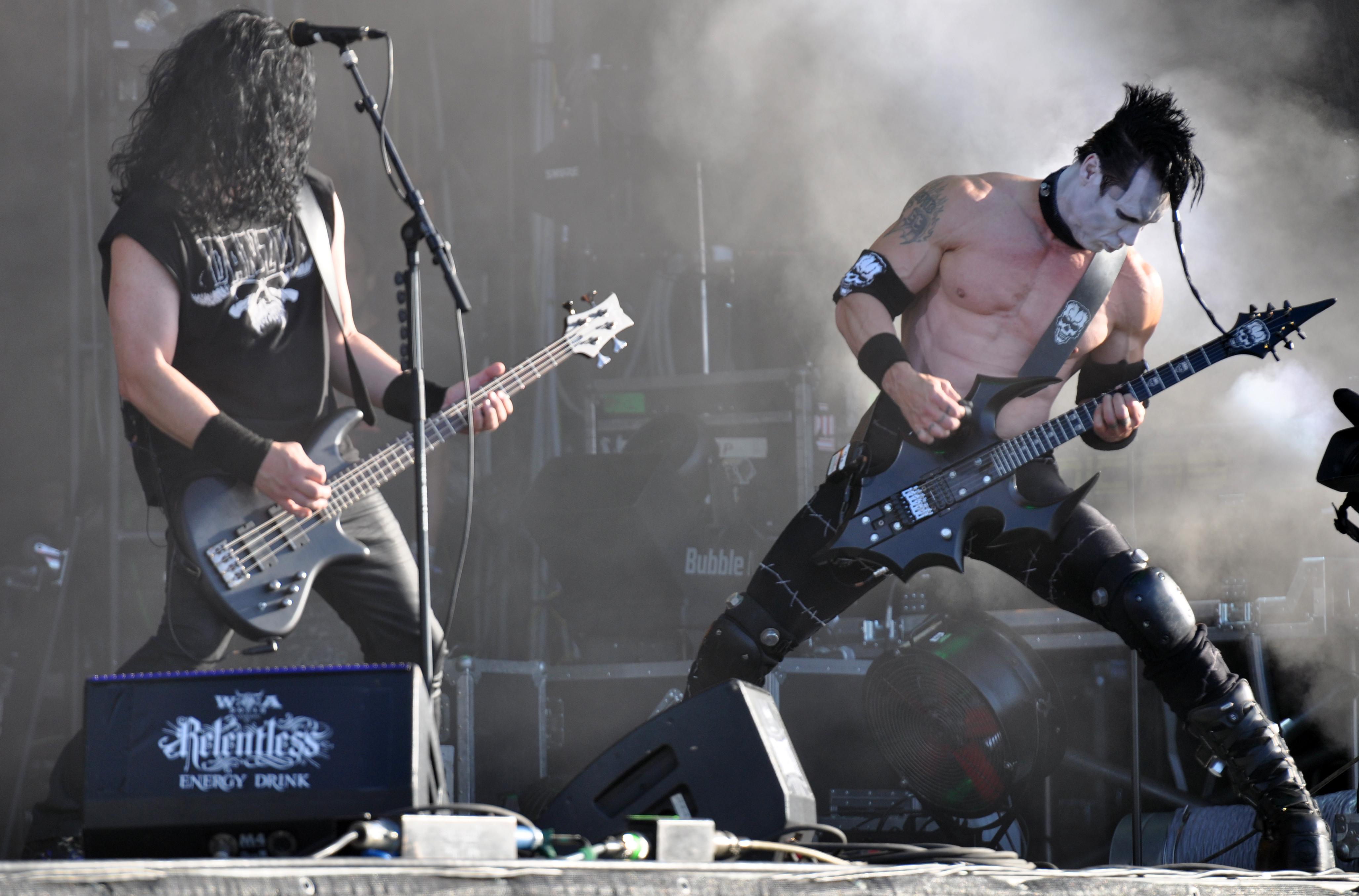 Danzig at Wacken Open Air 2013